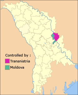 Raion de Dubasari (Moldavie)